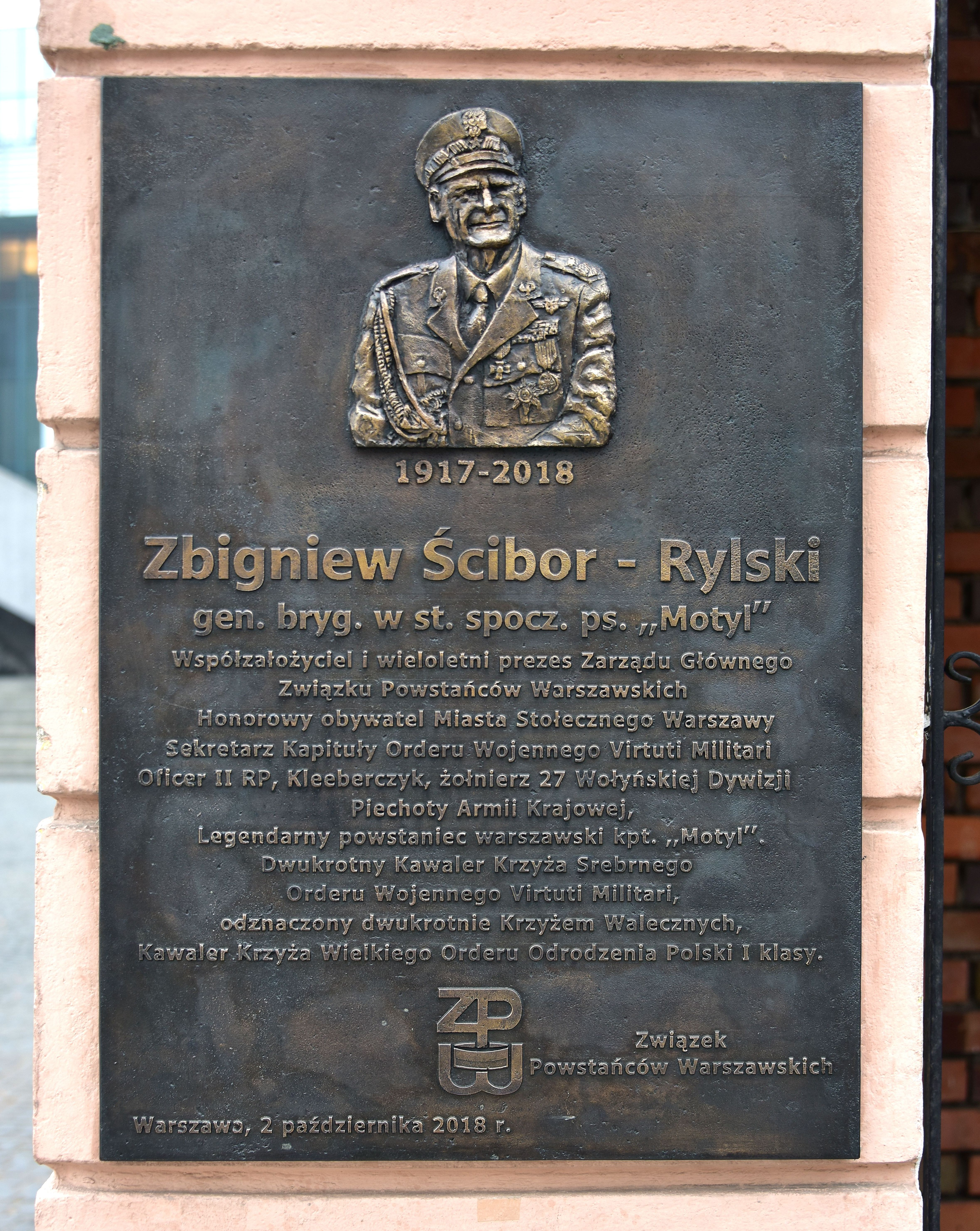 Tablica upamiętniająca gen. Zbigniewa Ścibora-Rylskiego przy ul. Długiej 22 w Warszawie